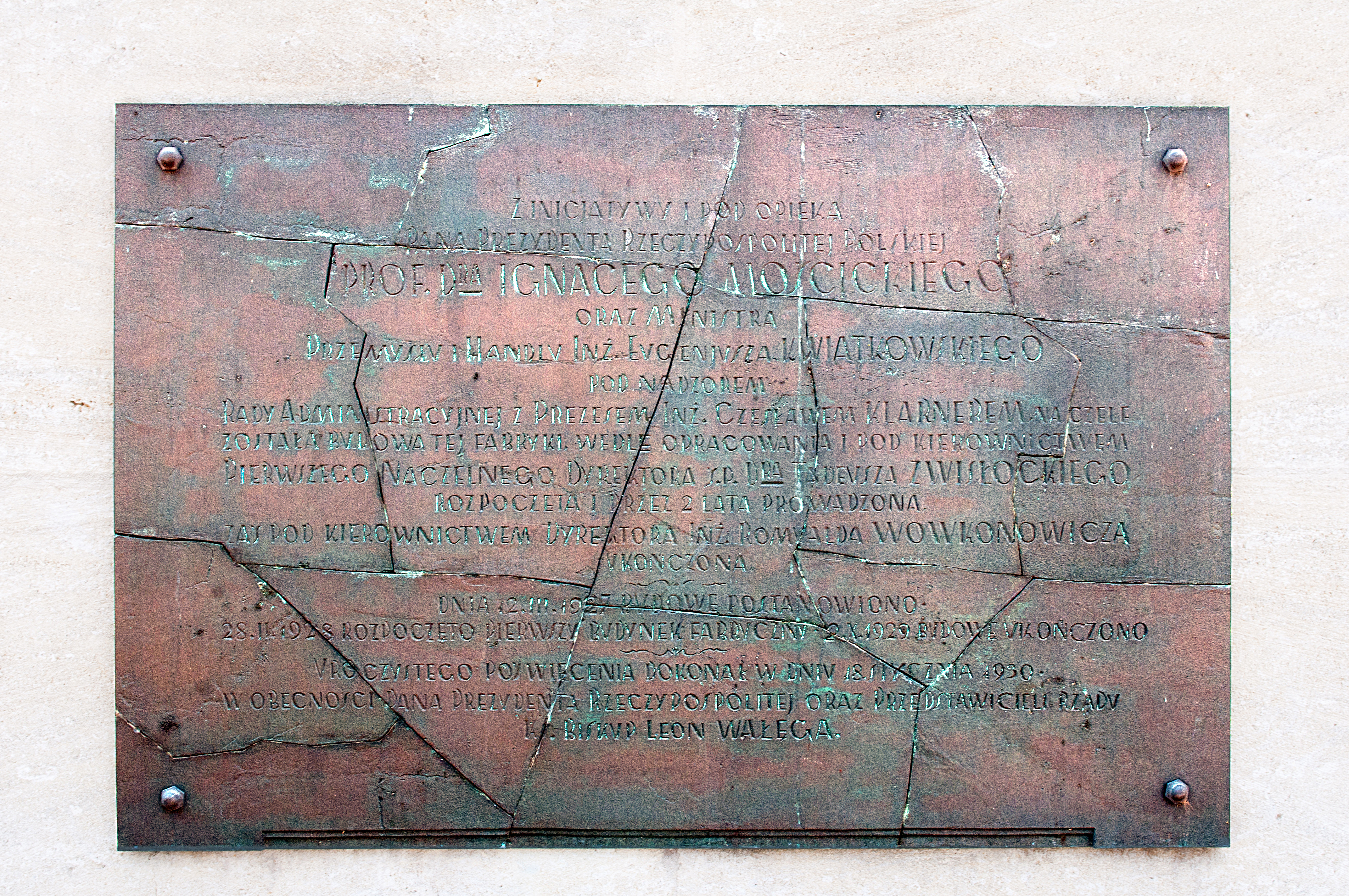 Obelisk